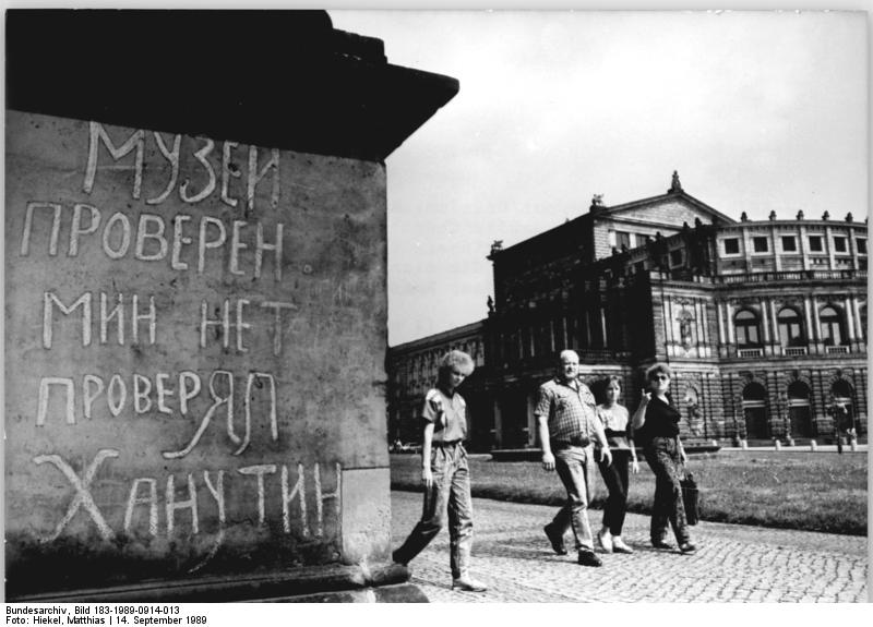 Dresden, Sempergalerie, Eingang, Inschrift ADN-ZB Hiekel 14.9.1989-Dresden: Kunstschätze - "Museum überprüft. Keine Minen. Es prüfte Chanutin.": Diese Inschrift am Eingang der Sempergalerie erinnert an die Tage der Befreiung der Stadt durch die Rote Armee, die sich damals unschätzbare Verdienste um die Rettung Dresdner Kunstwerke erwarb. (Sieh auch 1989-0914-12N und 14N)